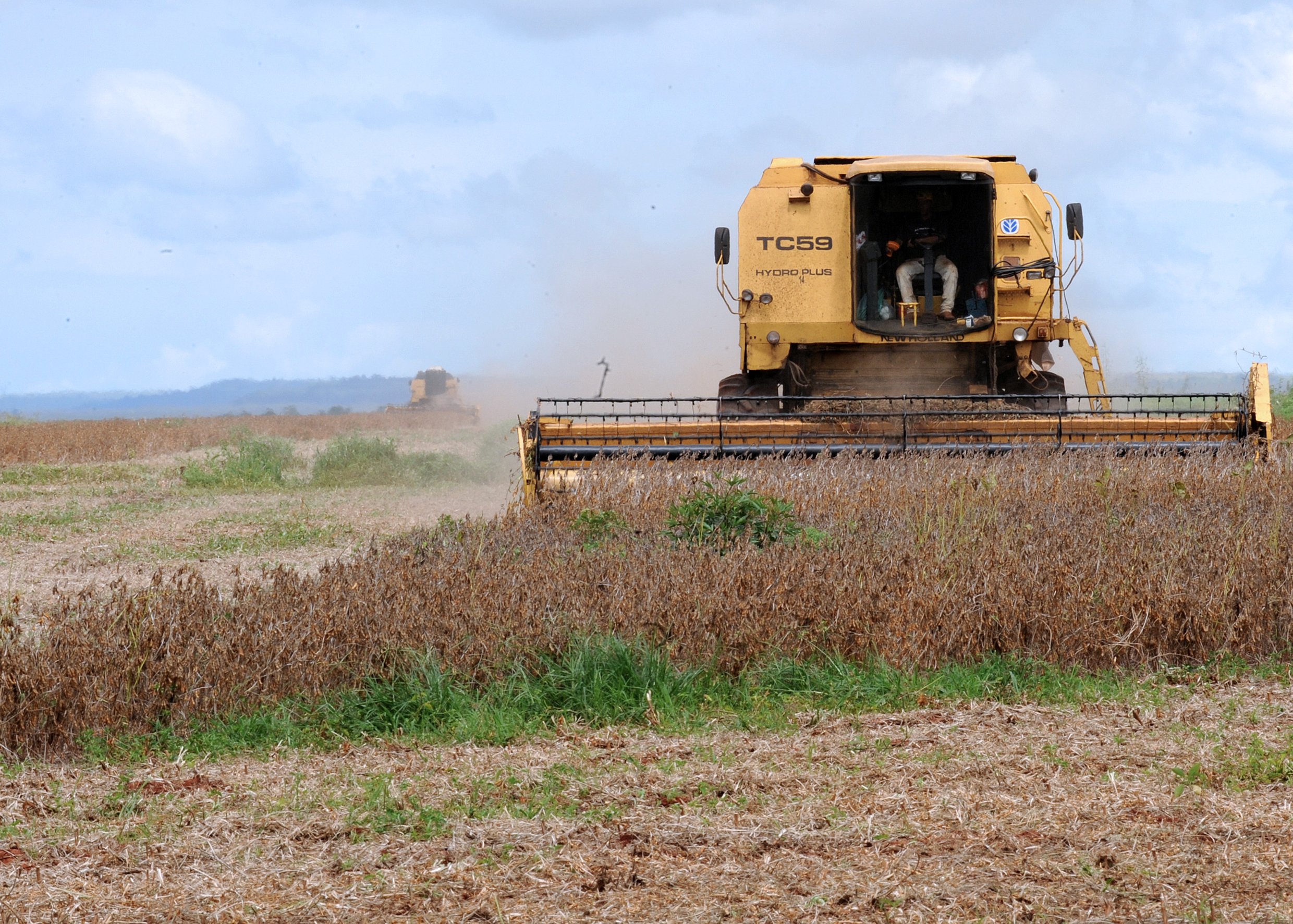 Rondonópolis, Mato Grosso, colheita de soja